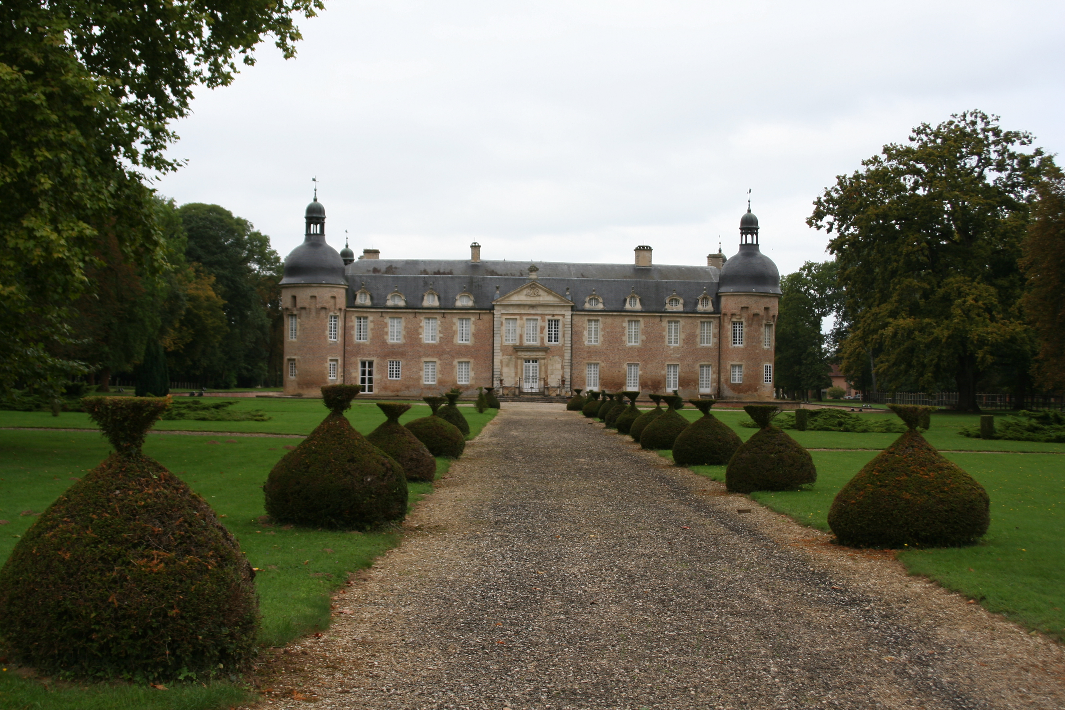 Pierre-de-Bresse, Schloss / volkskundliches Museum der Bresse, Aufnahme von Osten